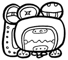 Majų glifas, simbolizuojantis miestą Palenke. Padarytas naudojant freeware Maya font.